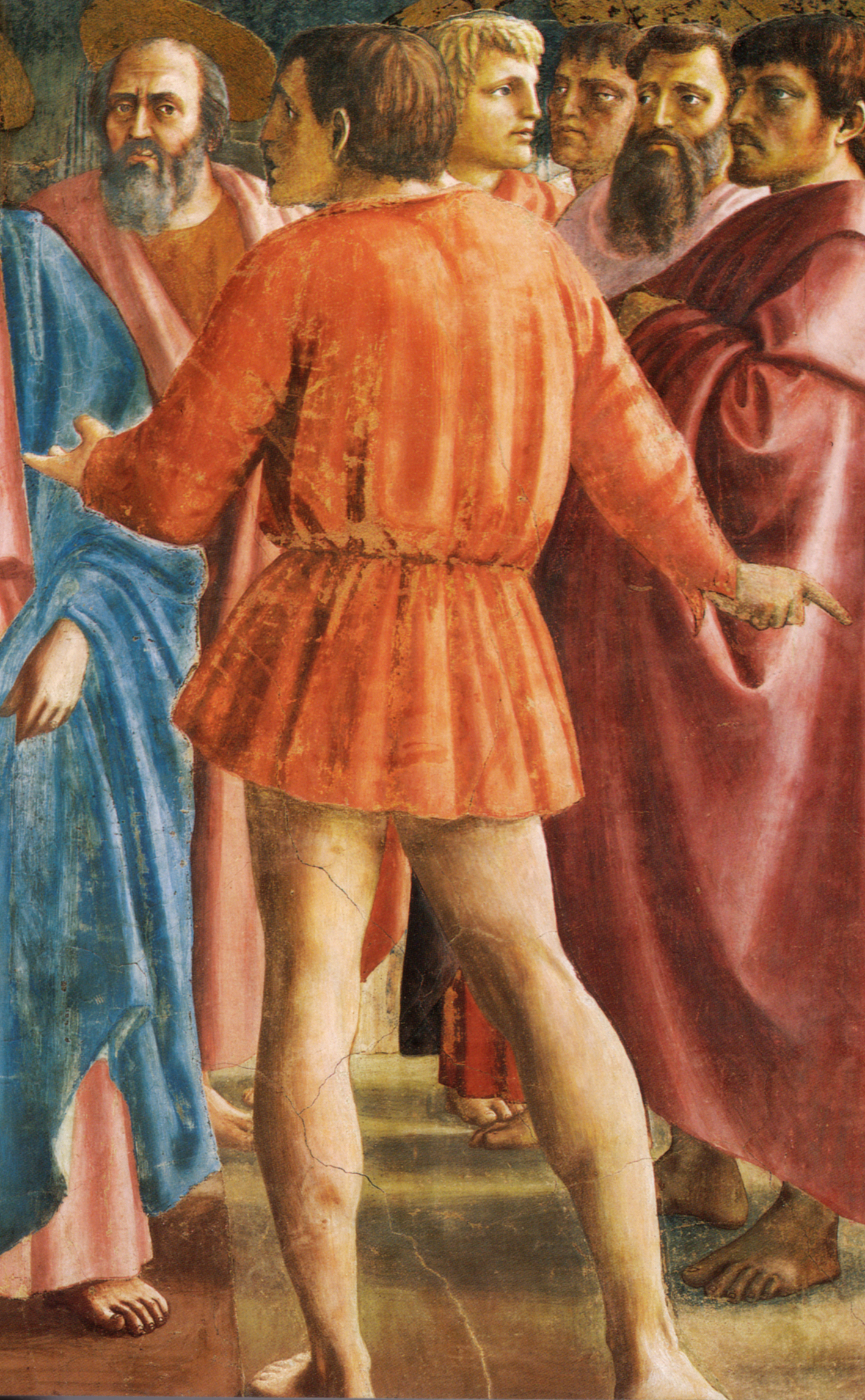 detail